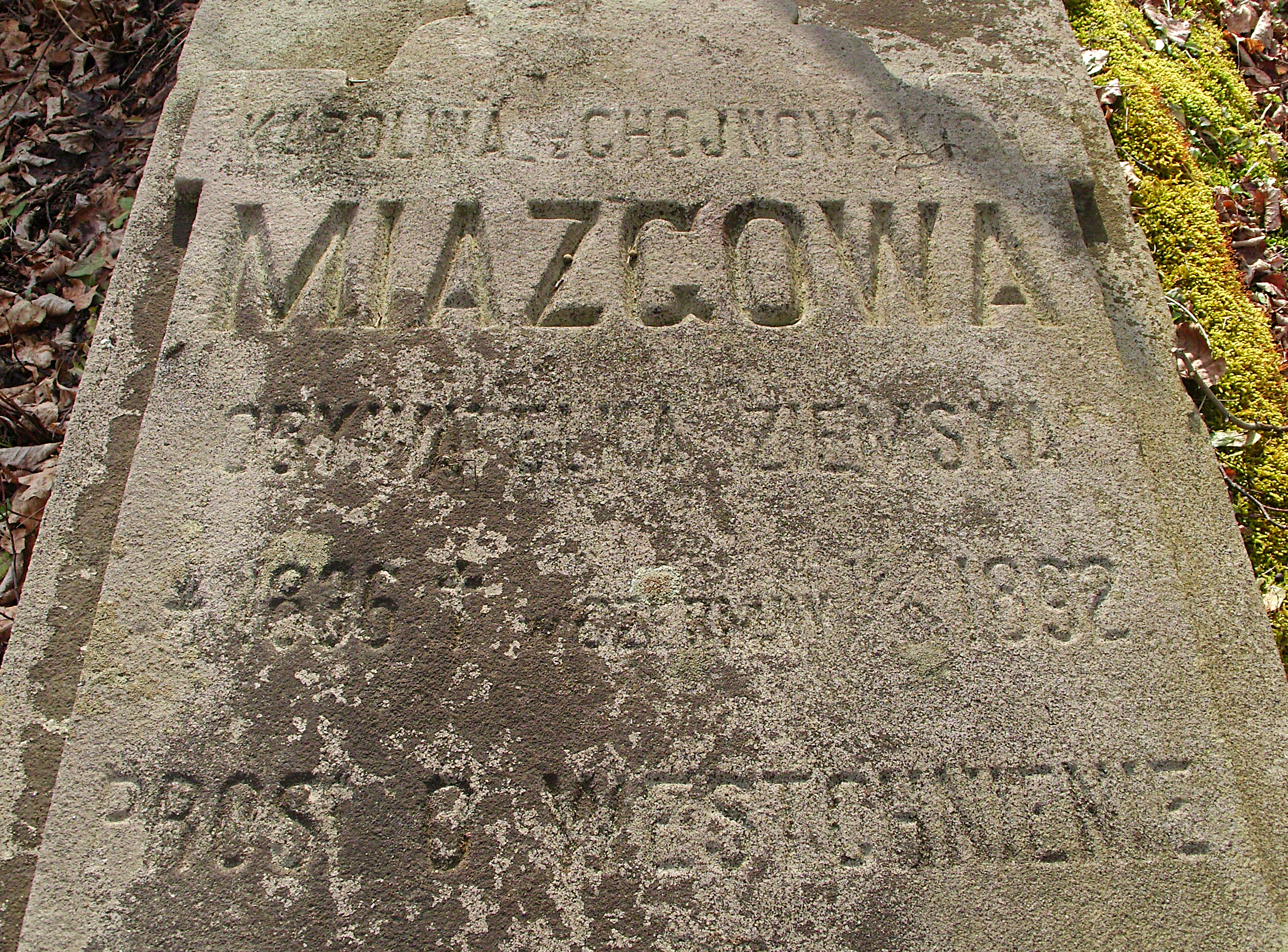 Nagrobek obywatelki ziemskiej z końca XIX wieku, na Starym Cmentarzu w Bączalu Dolnym